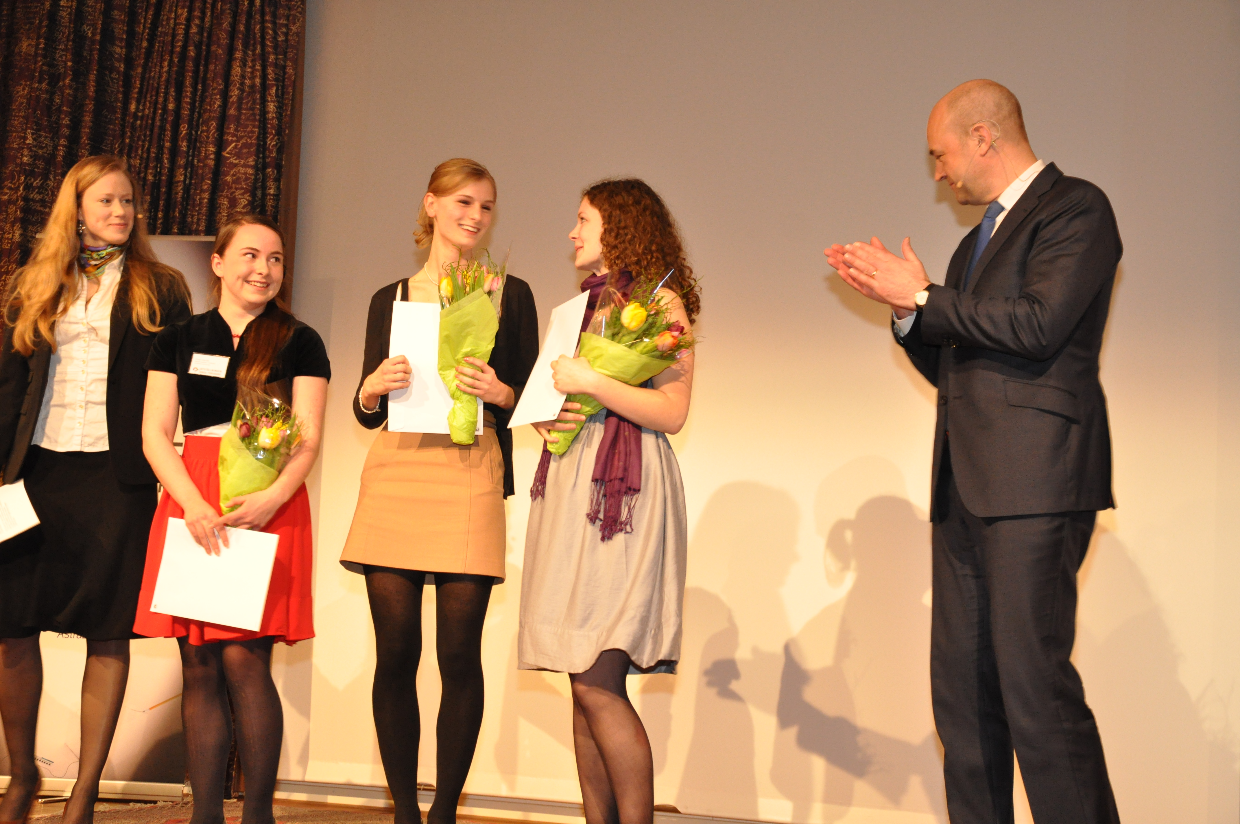 Utdelninga av priser i tävlingen "Utsällningen Unga Forskare", på Kungliga Vetenskapsakademin, 7:e april 2011 Statsminister Fredik Reinfeldt delade ut priser. På bilden mottager Frida Ulander, Louise Dahlin och Sanna Renius ett resestipendium.